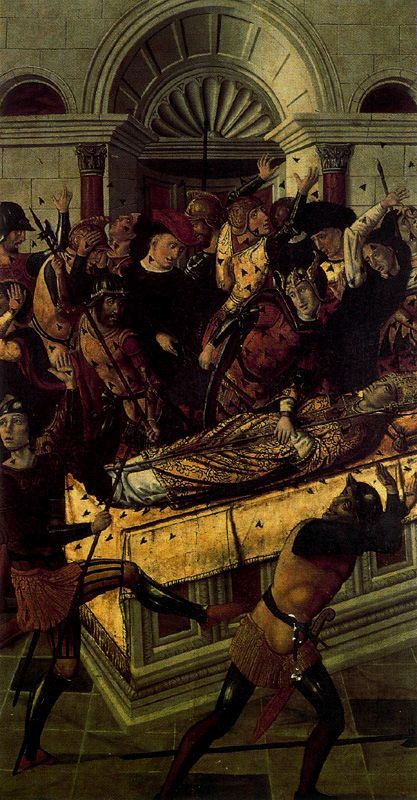 La obra representa al mártir cristiano San Narciso de Gerona.